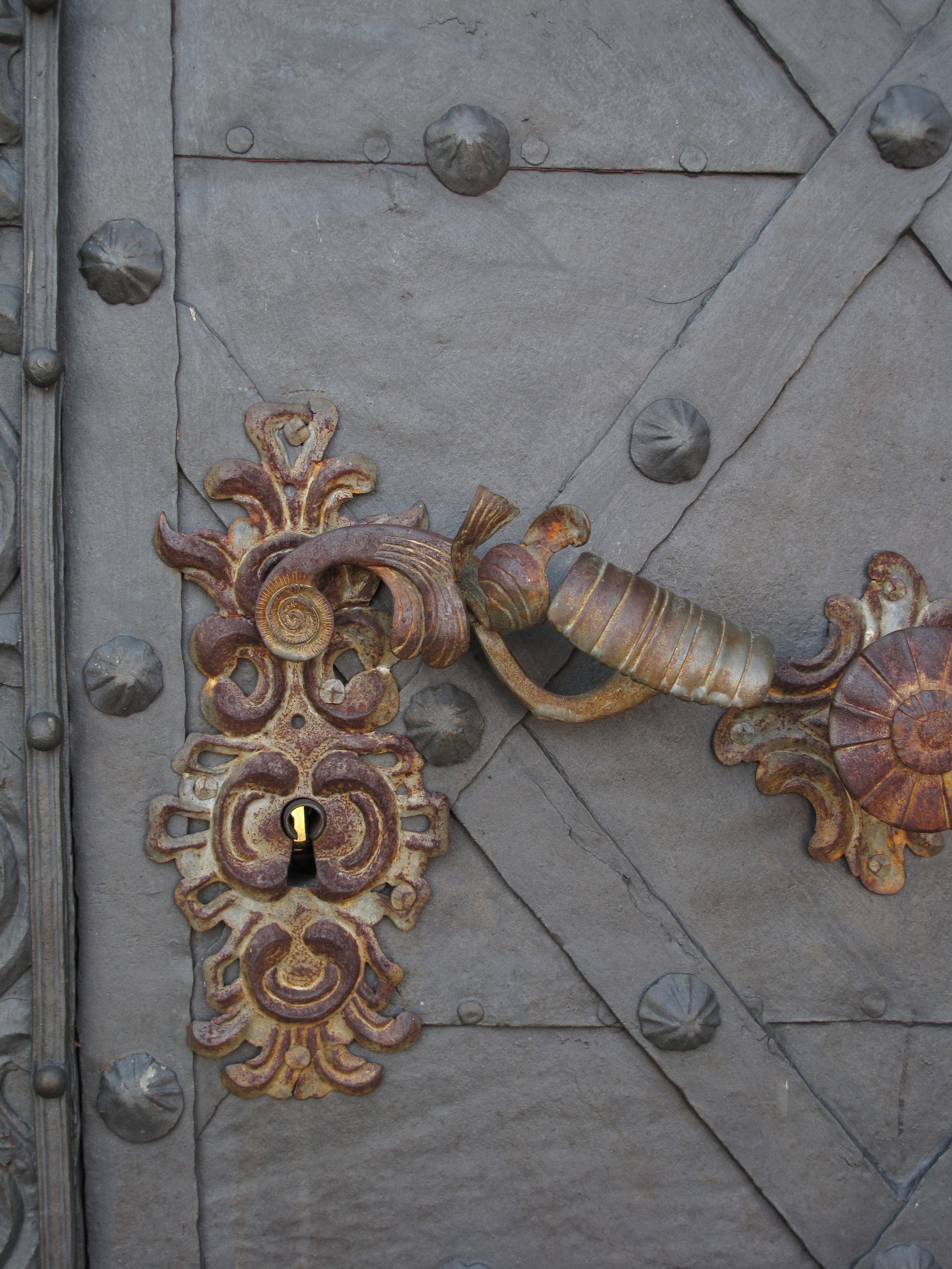 Detail sepekovské Lorety. Okres Písek, Česká republika.